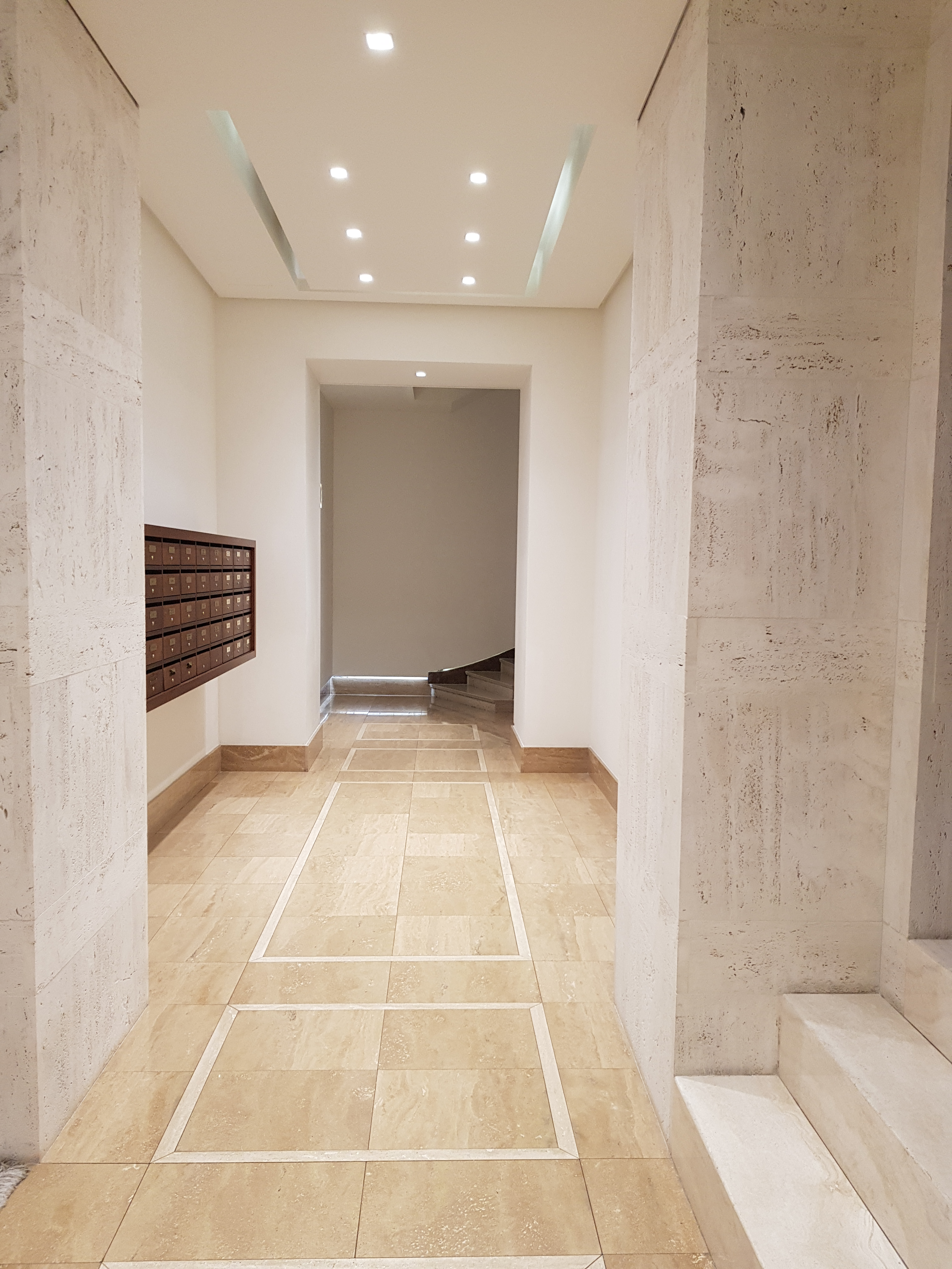 Veduta dell'interno dell'Albergo Nazionale